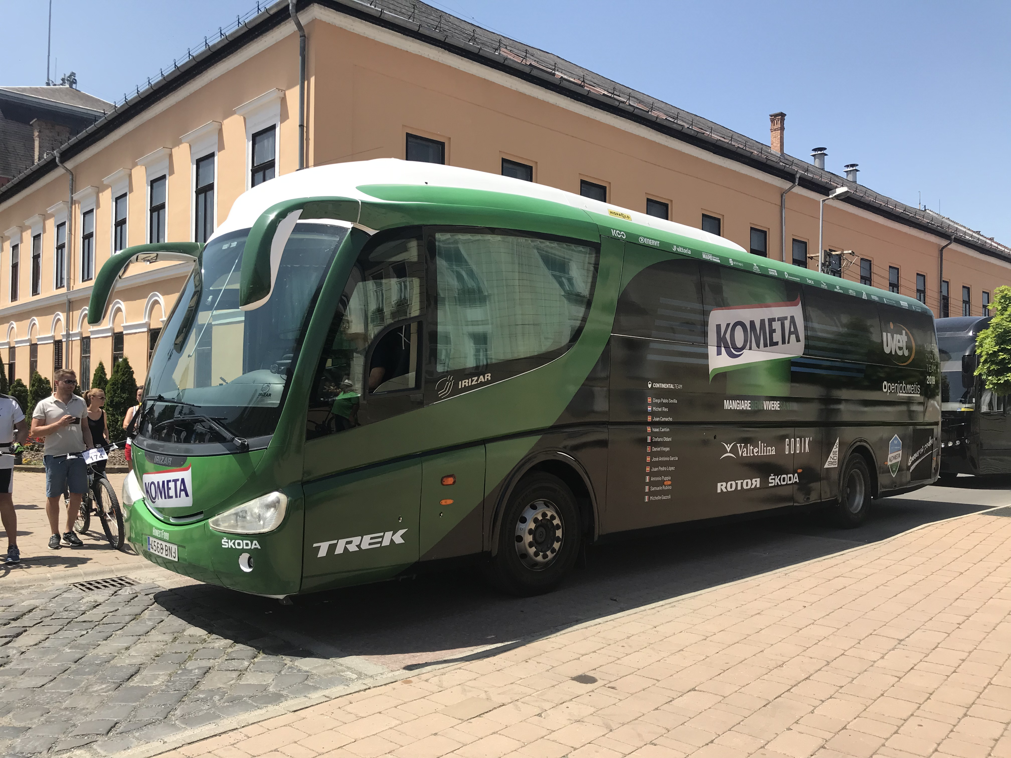 Kometa Cycling Team csapatszállító busza